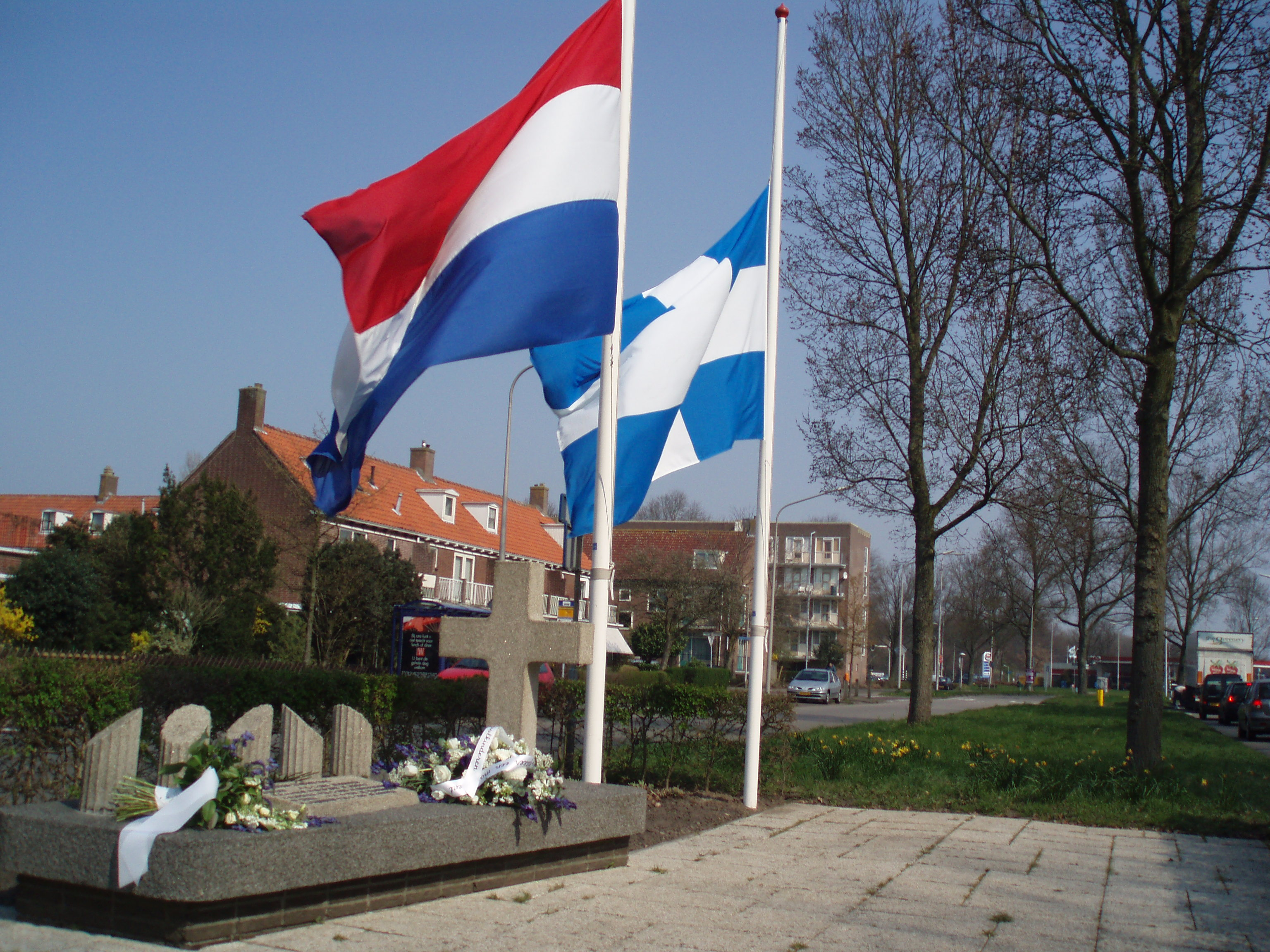 Monument aan de Meppelerstraatweg op de herdenkingsdag: 31 maart.